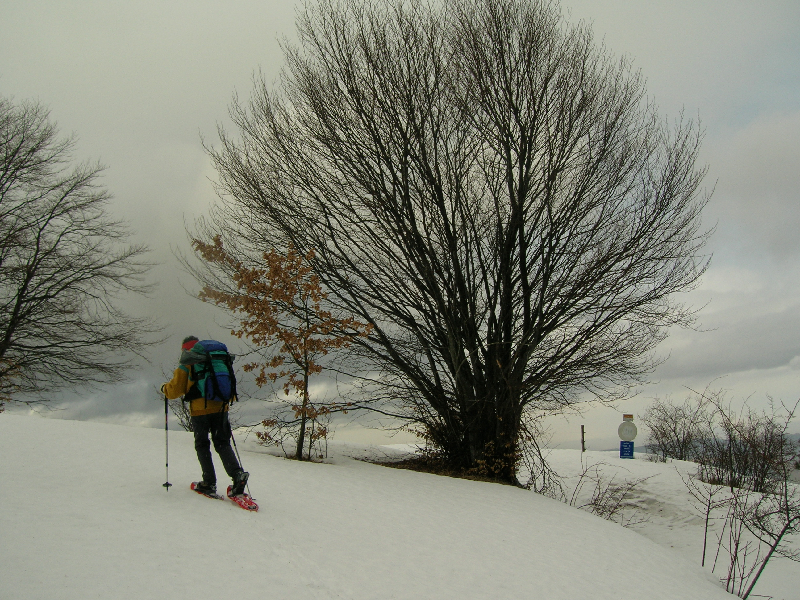 Uso delle ciaspole, Foto mia.